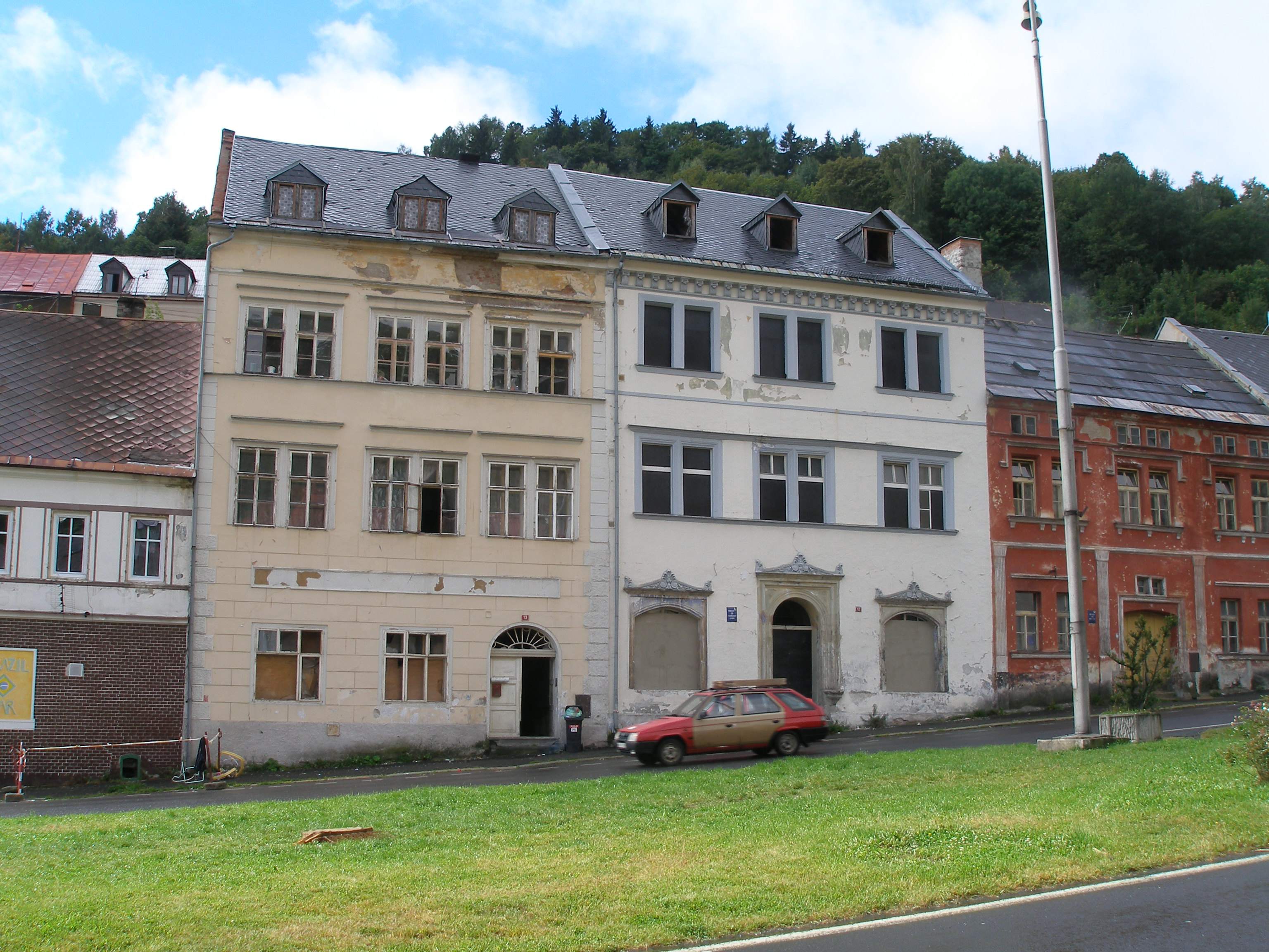 Jáchymov - domy na náměstí